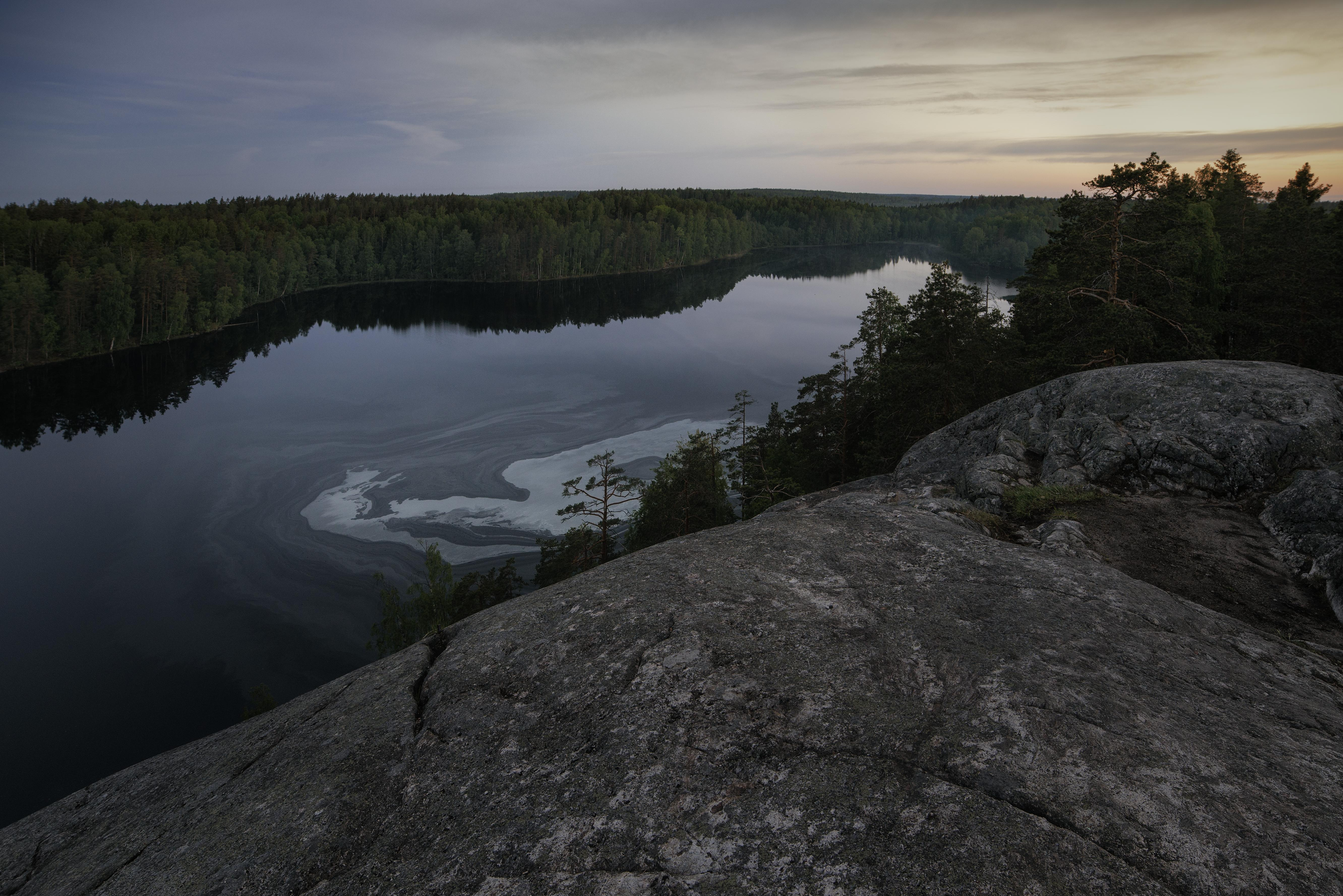 الطبعة العربية الصادرة عن المركز الثقافي العربي